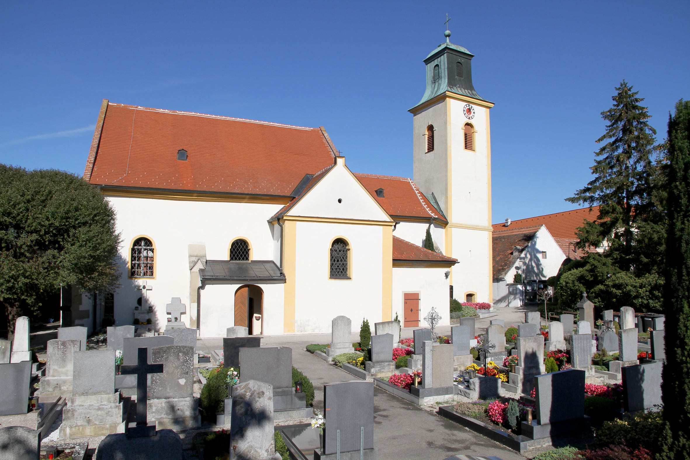 Katholische Pfarrkirche hl. Johannes d. T. in Freundorf, ein Ortsteil der niederösterreichischen Marktgemeinde Judenau-Baumgarten.